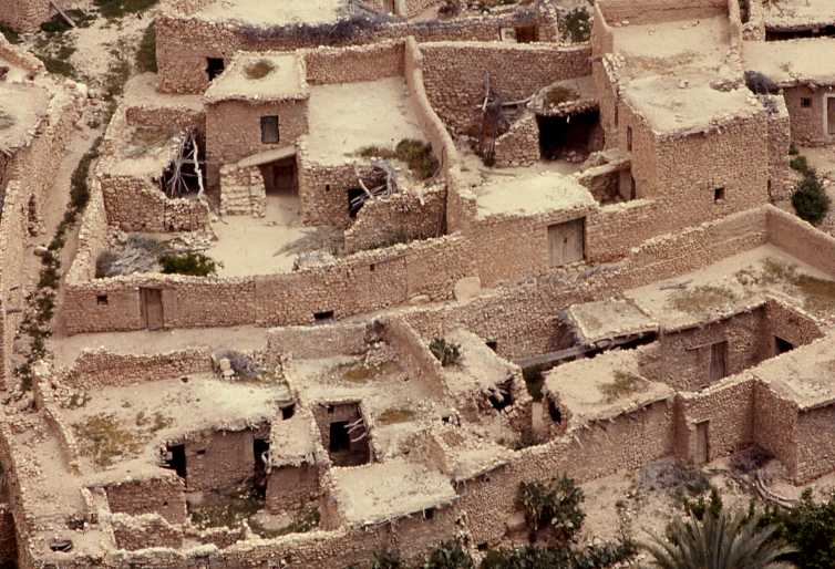 Maisons à Ghoufi, Aurès, Algérie.